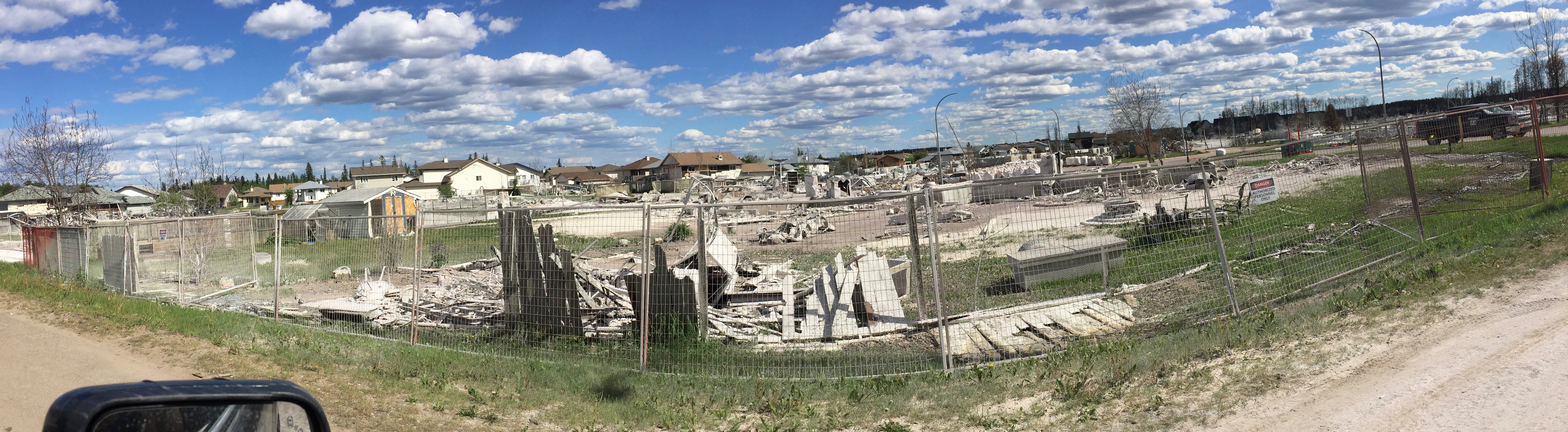 منطقة وودبفالو المدمرة